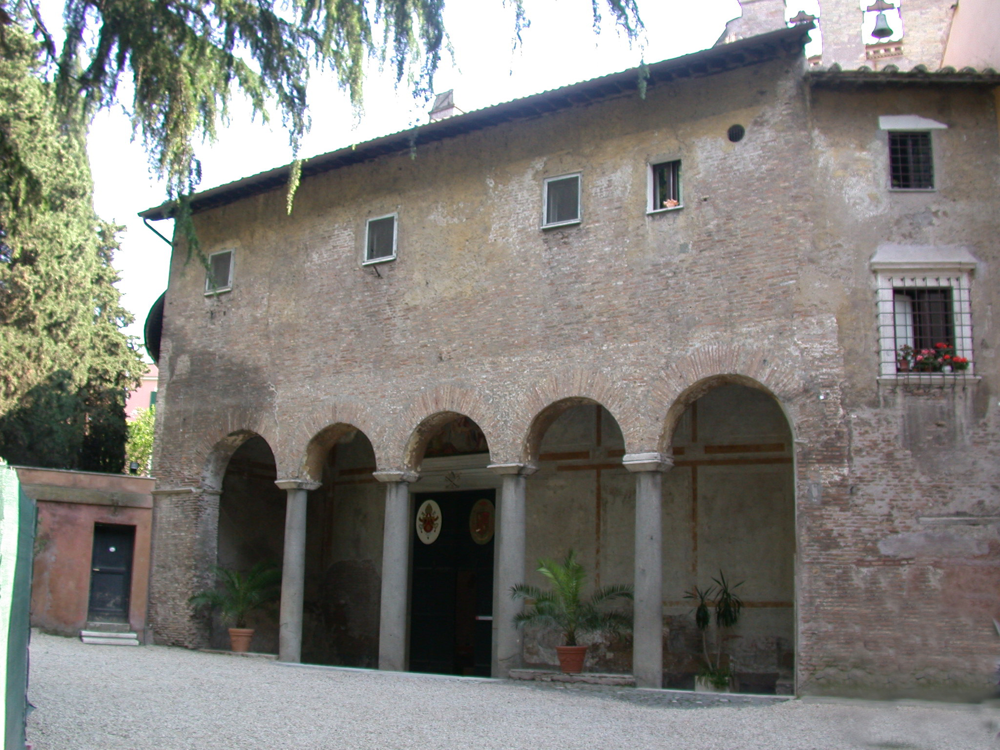 Chiesa di Santo Stefano Rotondo a Roma, portico di ingresso.